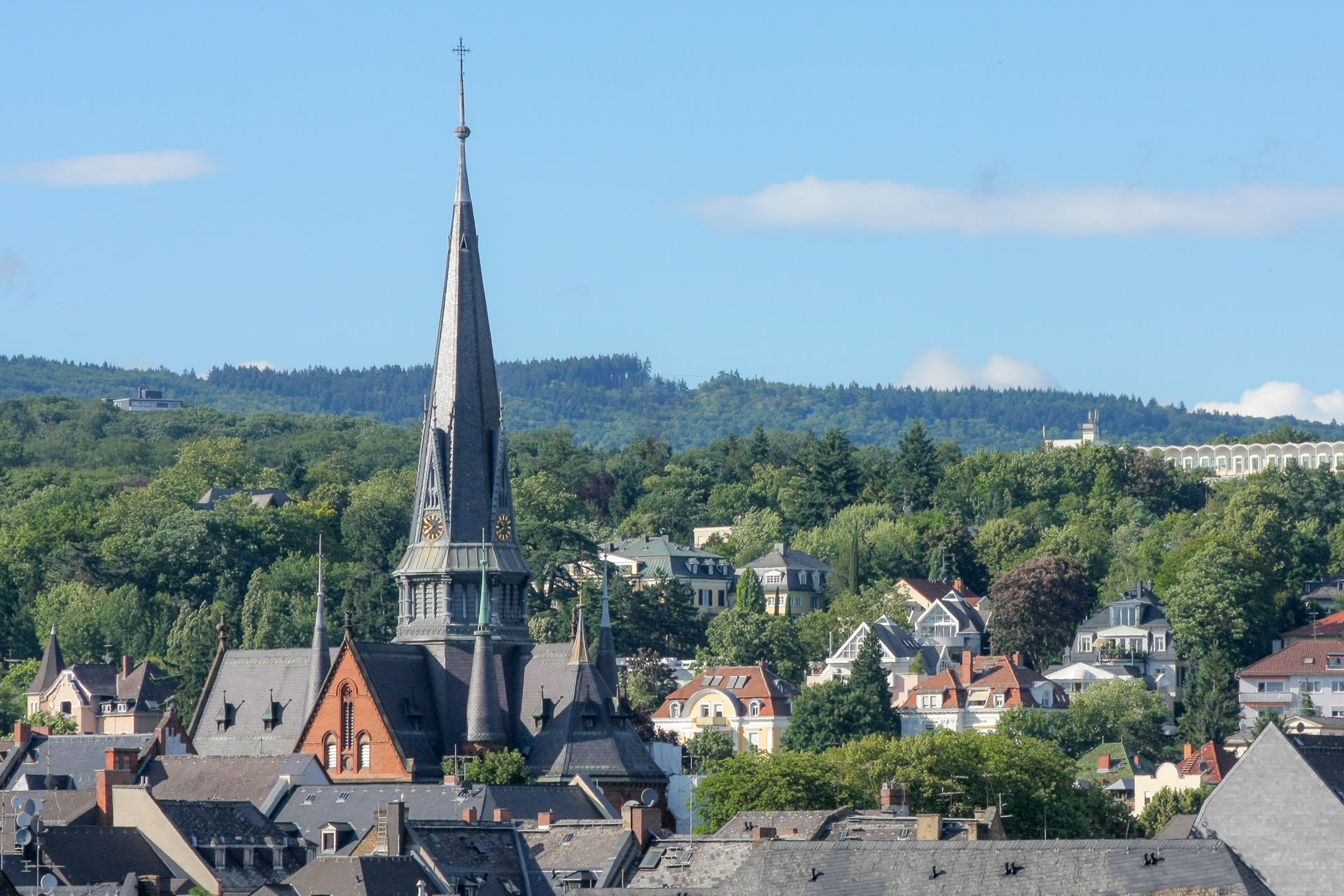 Die Bergkirche in mitten des Bergkirchenviertel, WiesbadenThis is a photograph of an architectural monument.